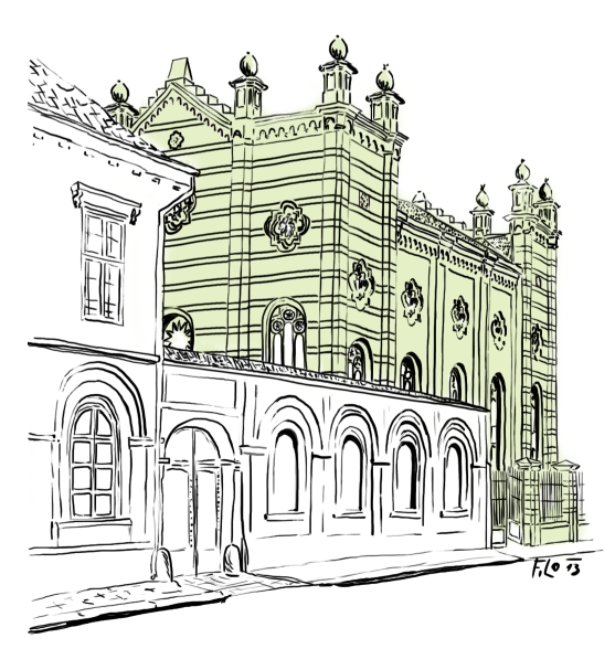 Synagoga v Jihlavě na kresbě.